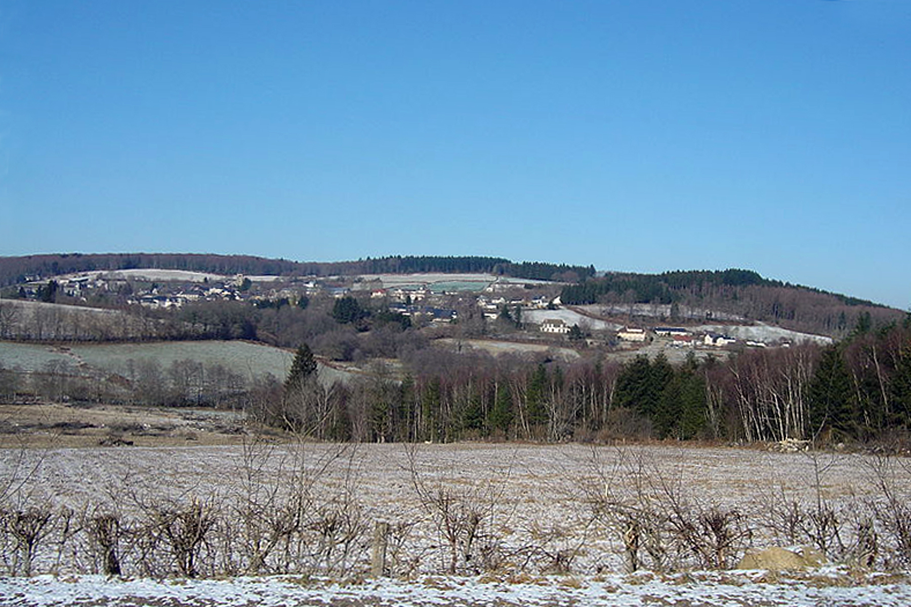 Vue générale de Montsauche-les-Settons